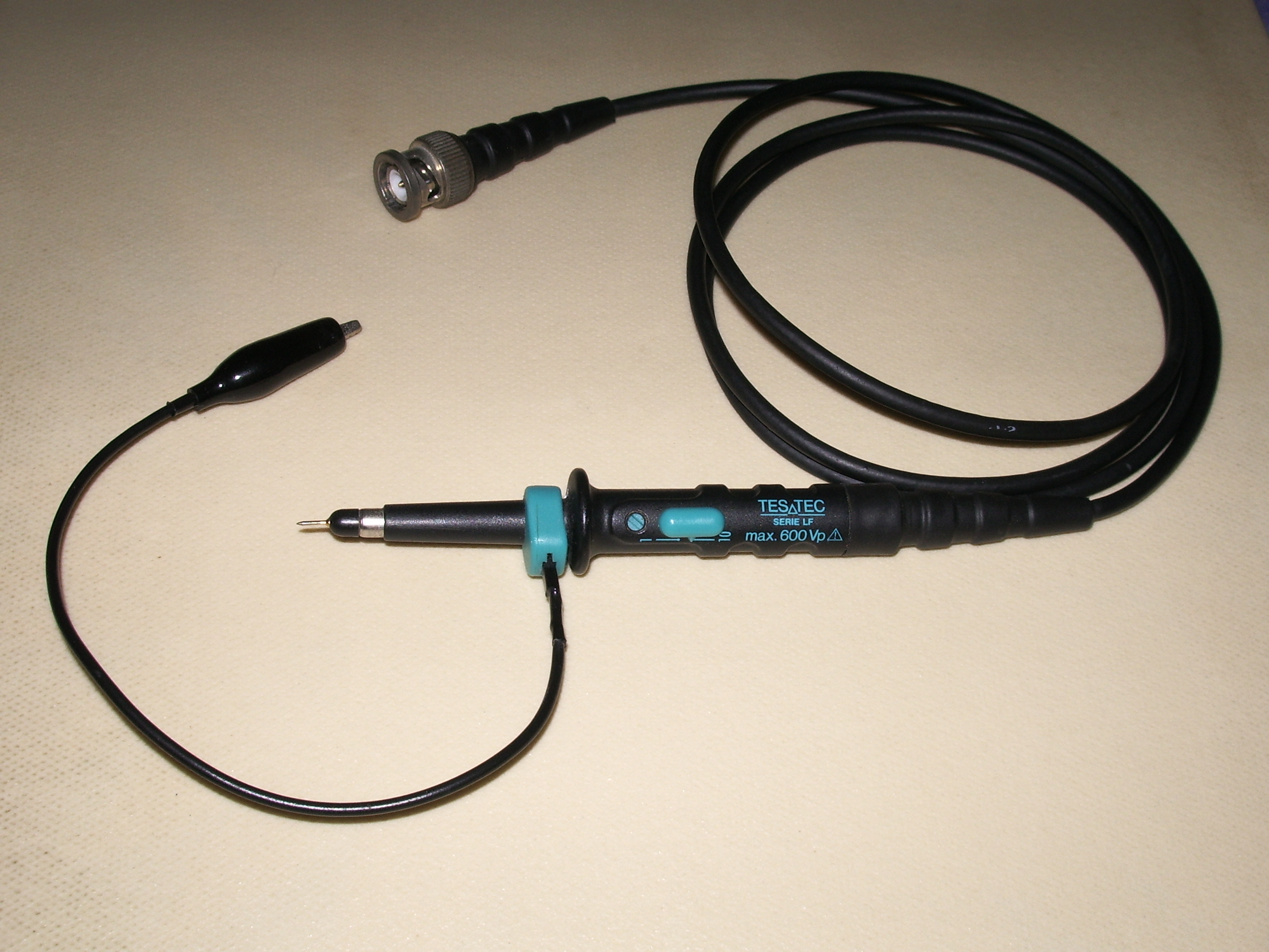 Typischer 10:1-Tastkopf für Oszilloskope für Labor- und Servicegebrauch.